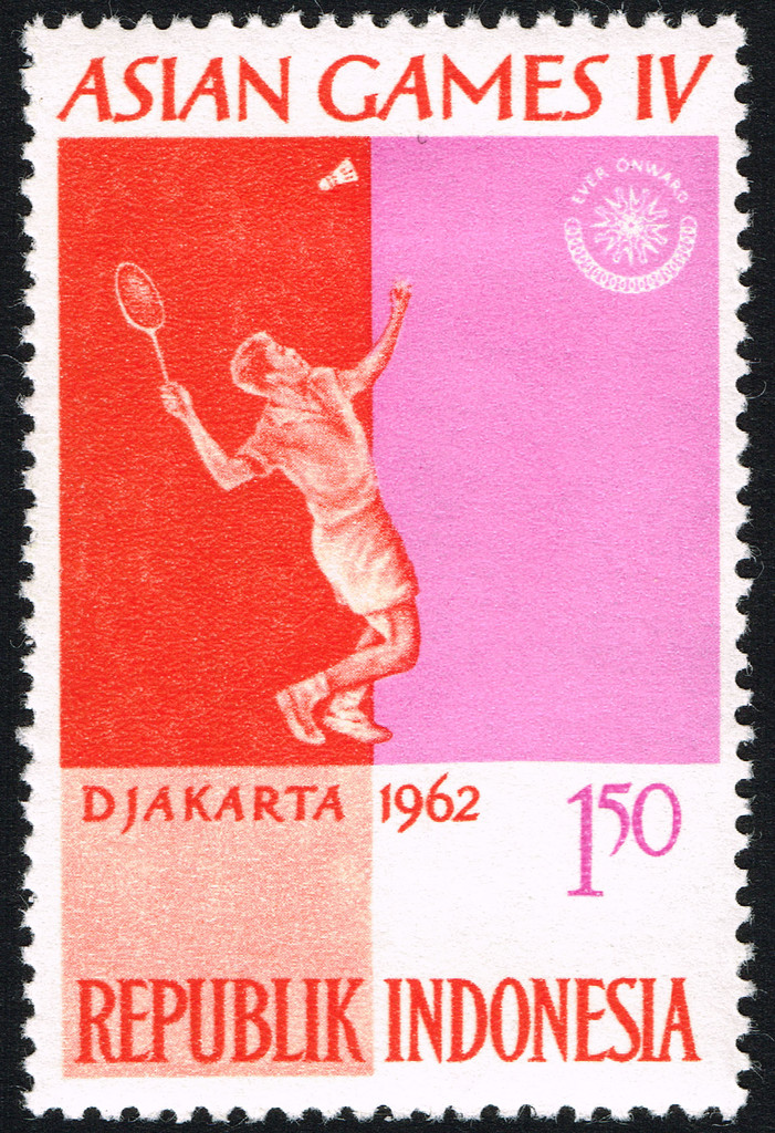 Asian Games IV